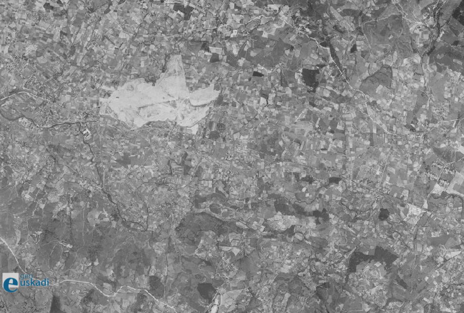 Bilboko aireportuaren ortoargazkia